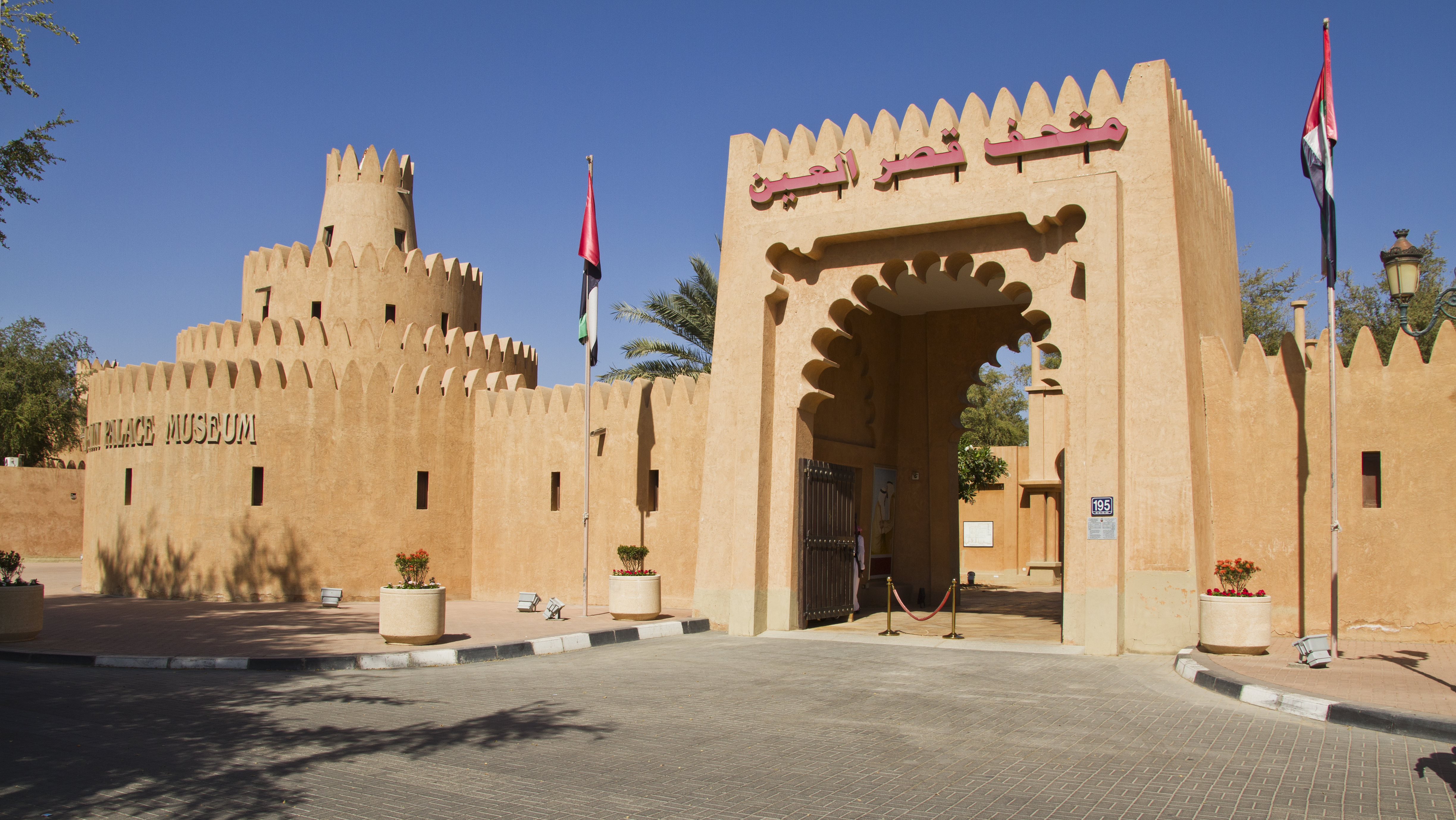 Al Mutawaa - Abu Dhabi - United Arab Emirates